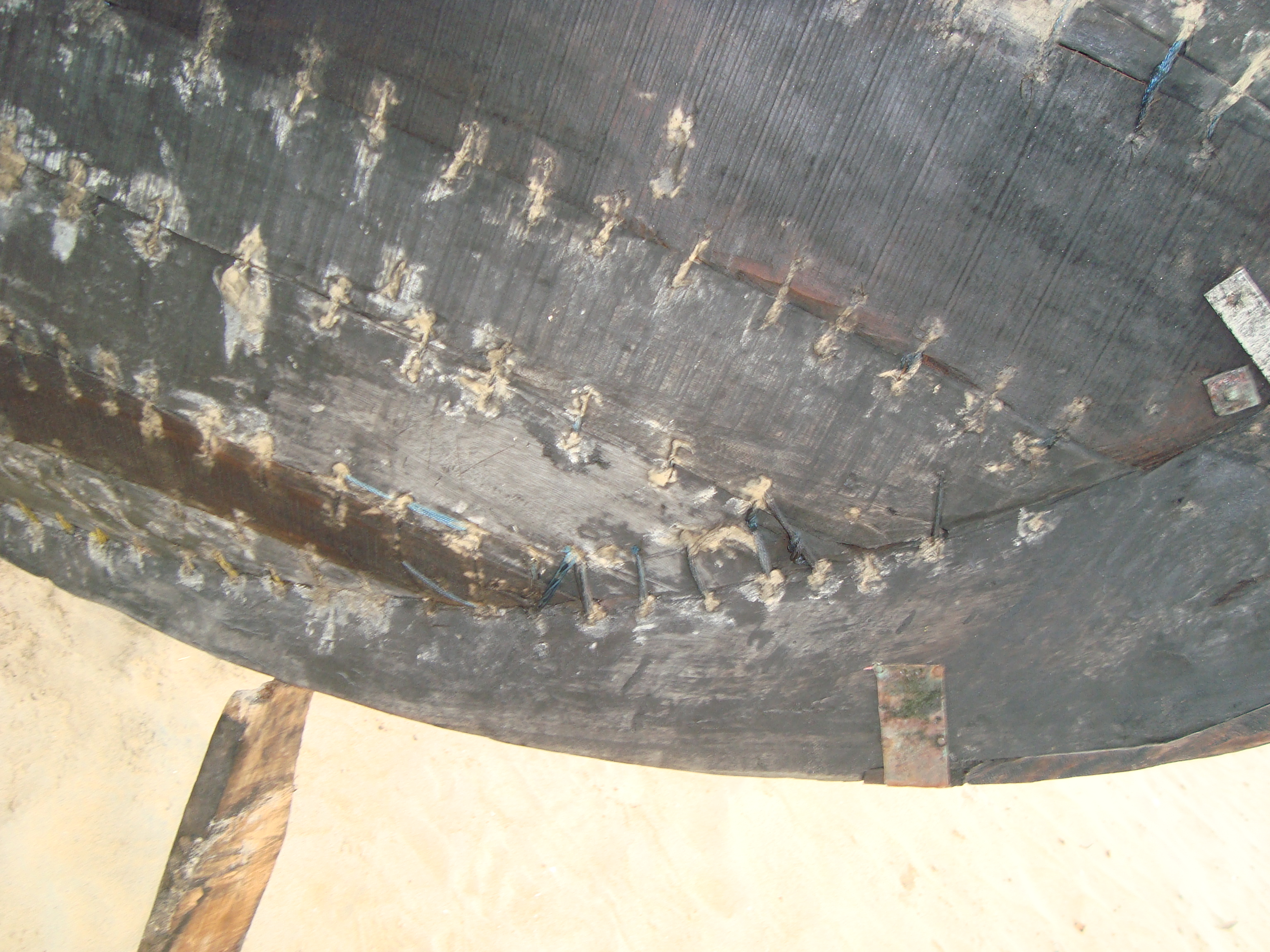 തൃശൂർ ജില്ലയിൽ എടമുട്ടം തീരത്ത് അടുപ്പിച്ചിട്ടിരിക്കുന്ന പലകകൾ തുന്നിച്ചേർത്ത മൽസ്യബന്ധനതോണി